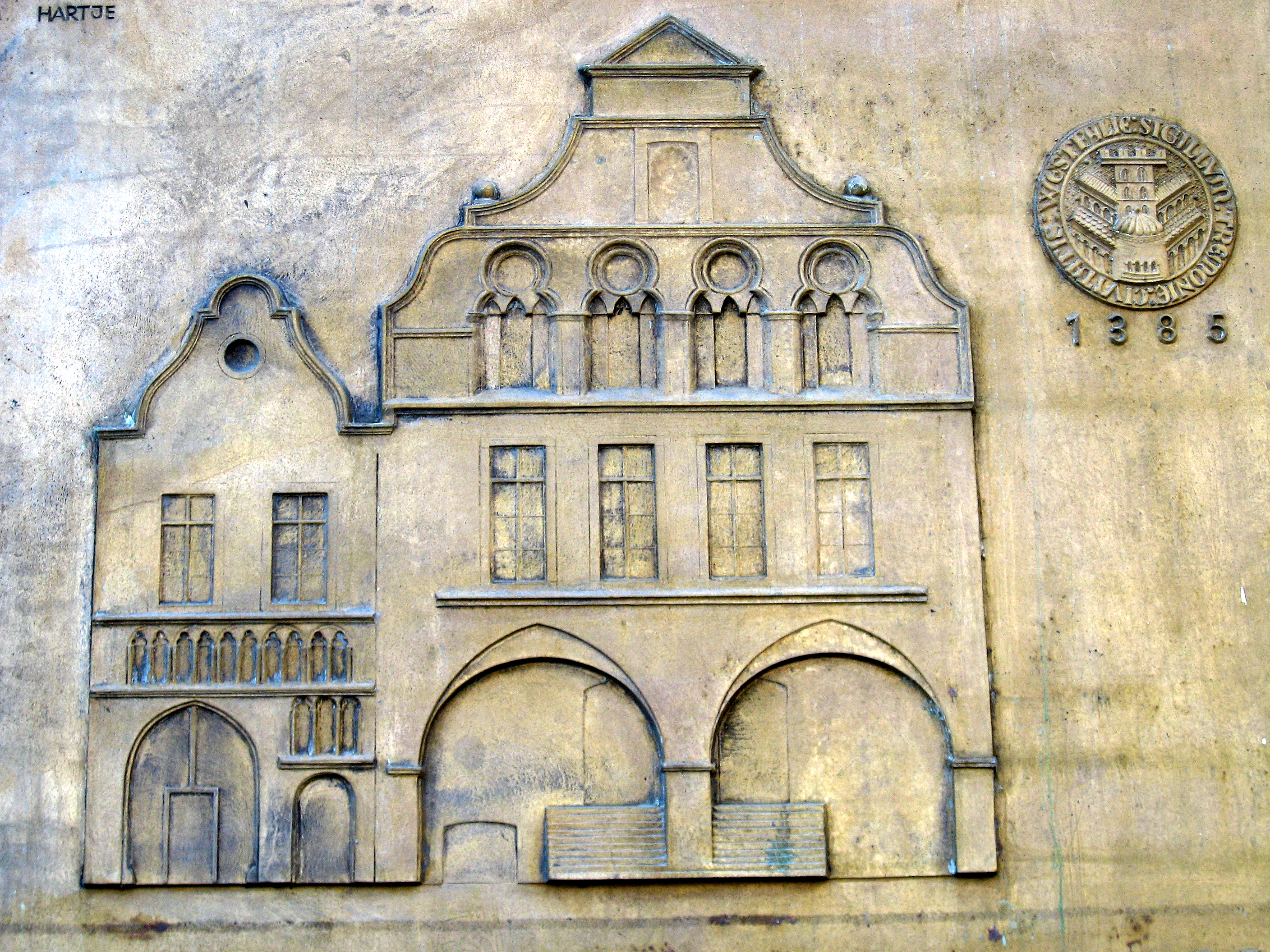 Dortmund, Alter Markt, Gedenktafel mittelalterliches Rathaus am Karstadt-Sport-Haus